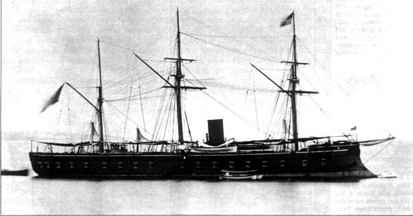 La pirofregata corazzata Ancona a Napoli